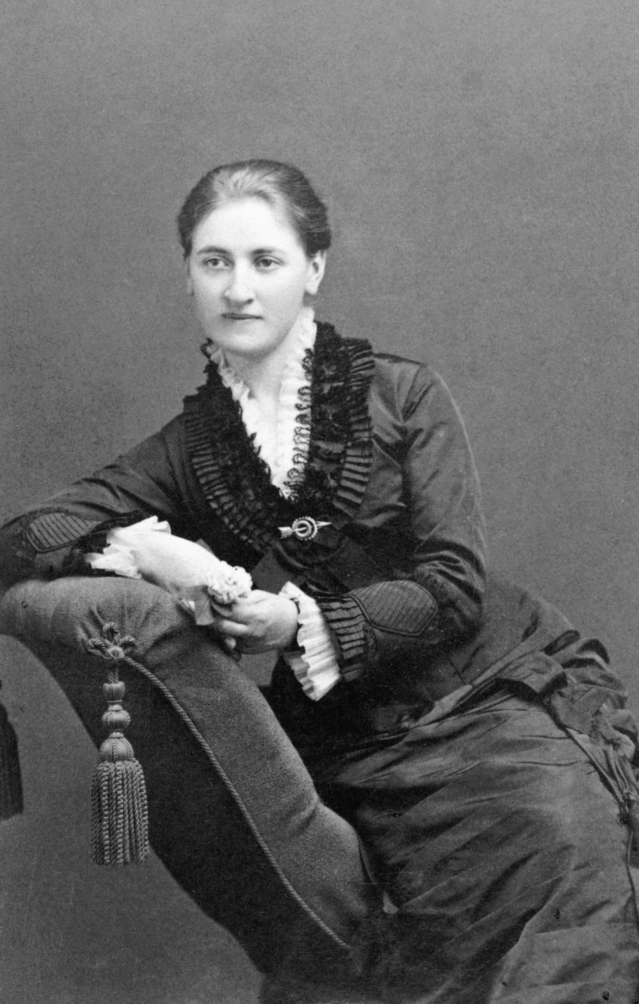 Vendela Andersson, sångare vid Nya teatern 1880